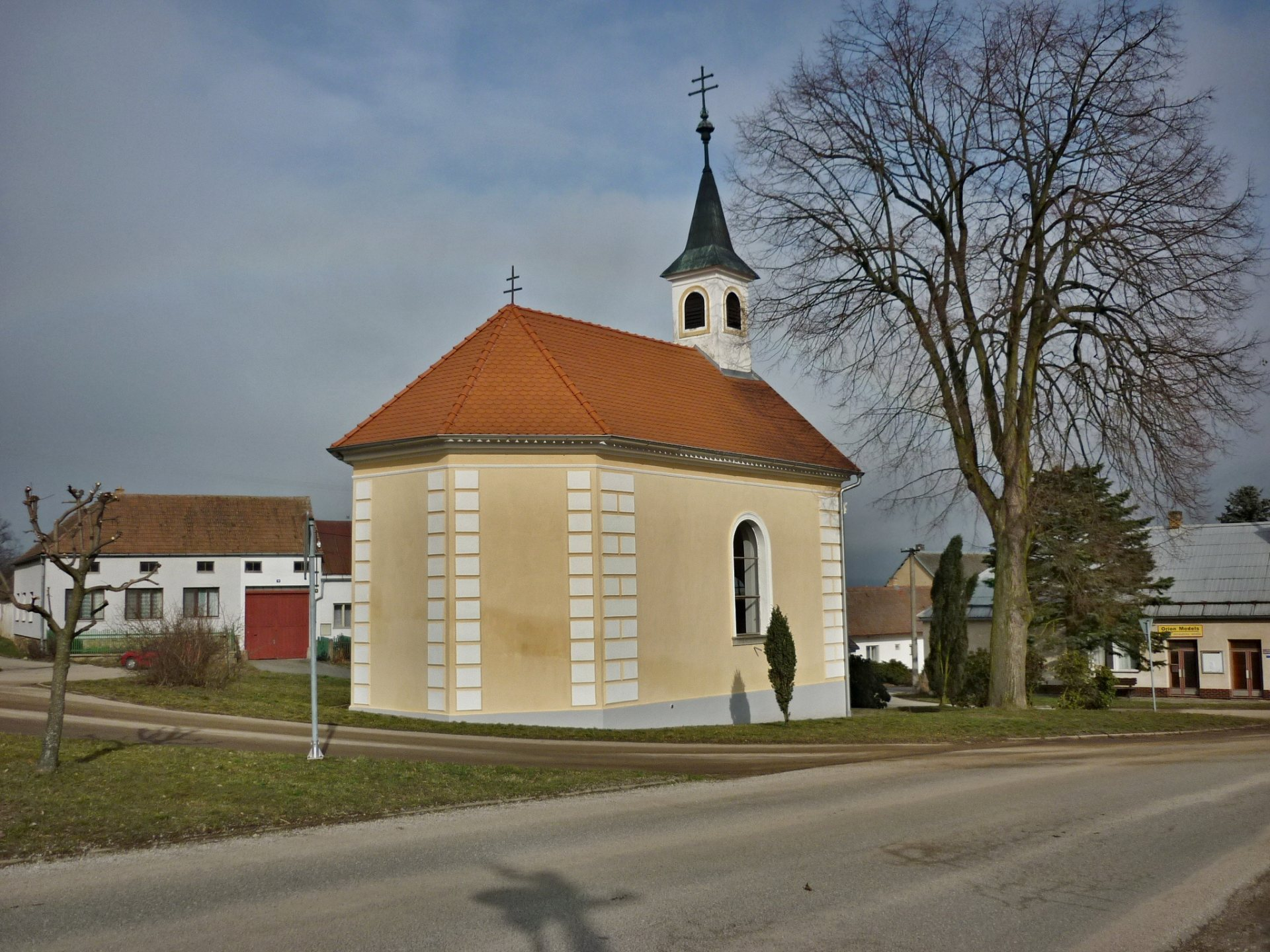 Chlumec, kaple sv. Cyrila a Metoděje (2)